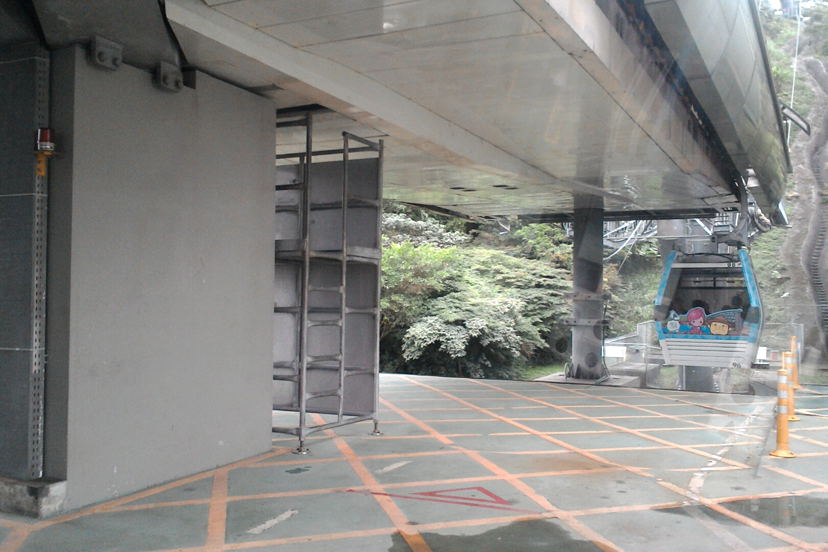 貓空纜車轉角二站內,台北市文山區二格山次分區政大里